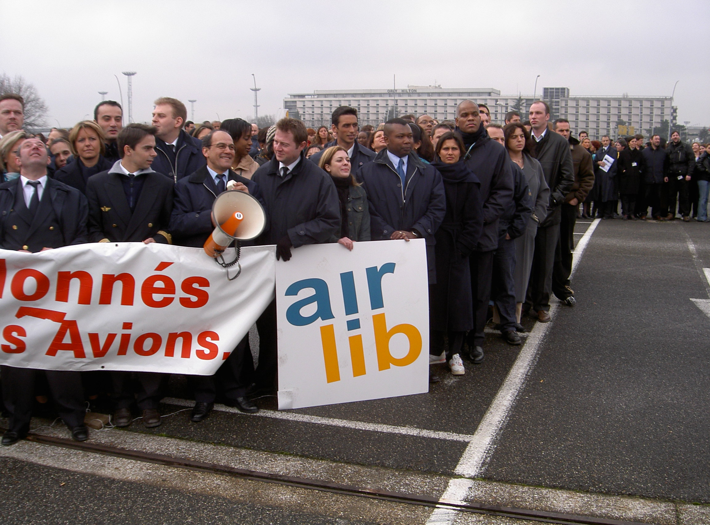 Manifestation Air Lib à l'aéroport d'Orly.